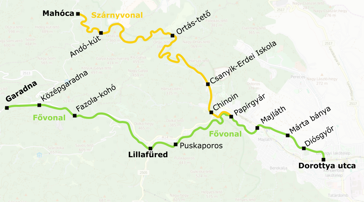 Lillafüredi Állami Erdei Vasút térkép 2016 This map may be incomplete, and may contain errors. Don't rely solely on it for navigation.